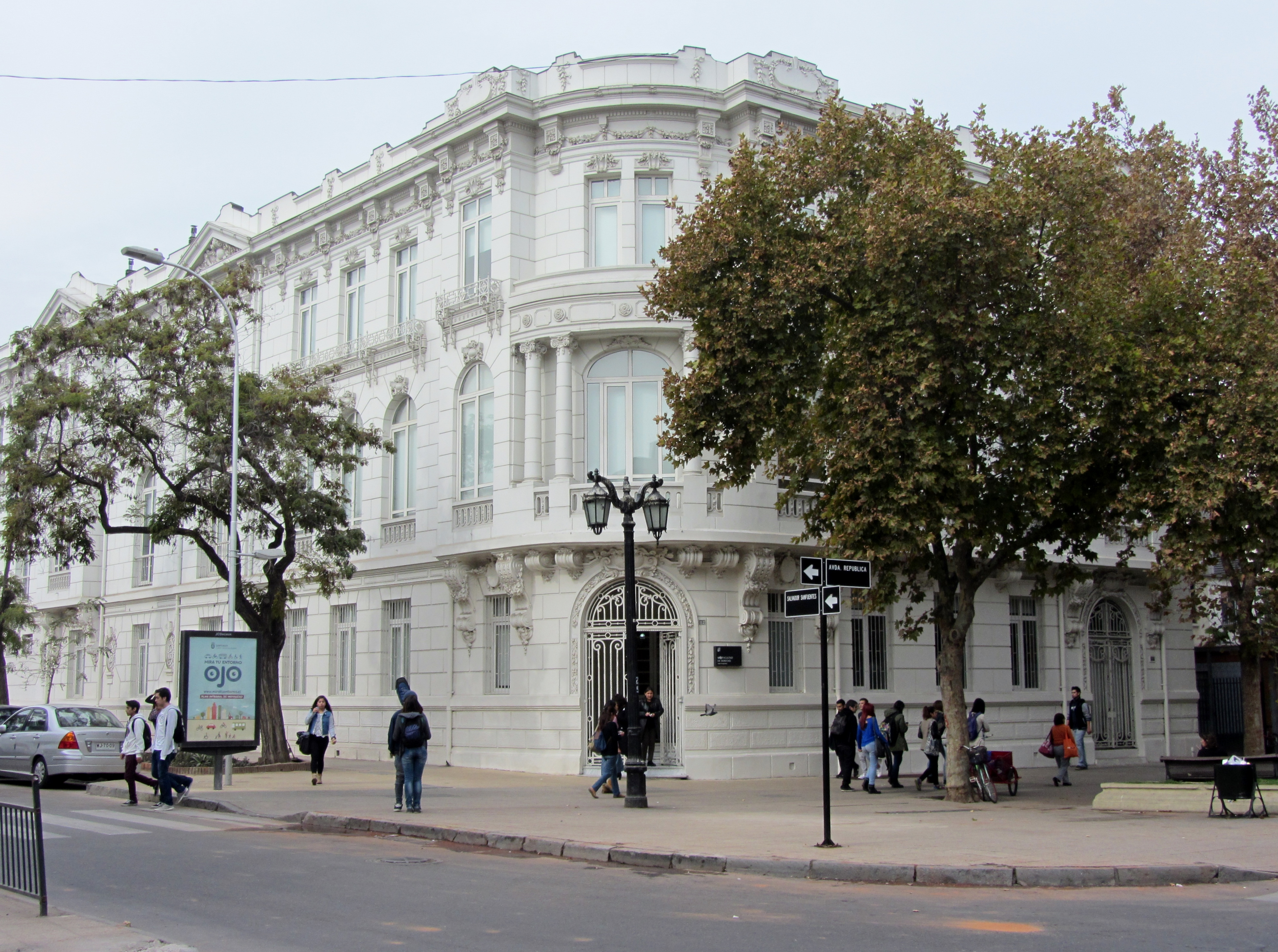 avenida República